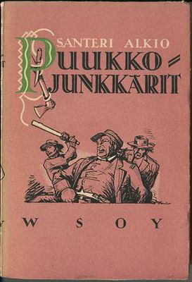 Santeri Alkion Puukkojunkkarit-kirjan pokkariversion kansikuva.